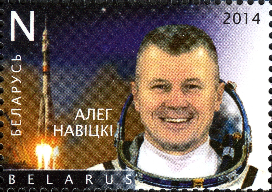 Паштовая марка Беларусі "Заваёўнікі космасу, ураджэнцы Беларусі" Беларуская (тарашкевіца): Паштовая марка Беларусі «Заваёўнікі космасу, ураджэнцы Беларусі»